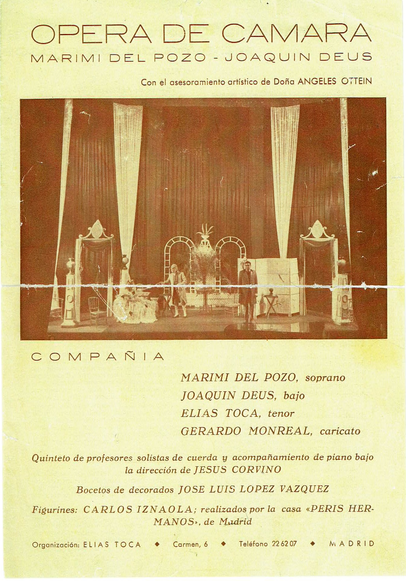 Programa de la companyia Òpera de cámara de Joaquín Déus i Marimí del Pozo.